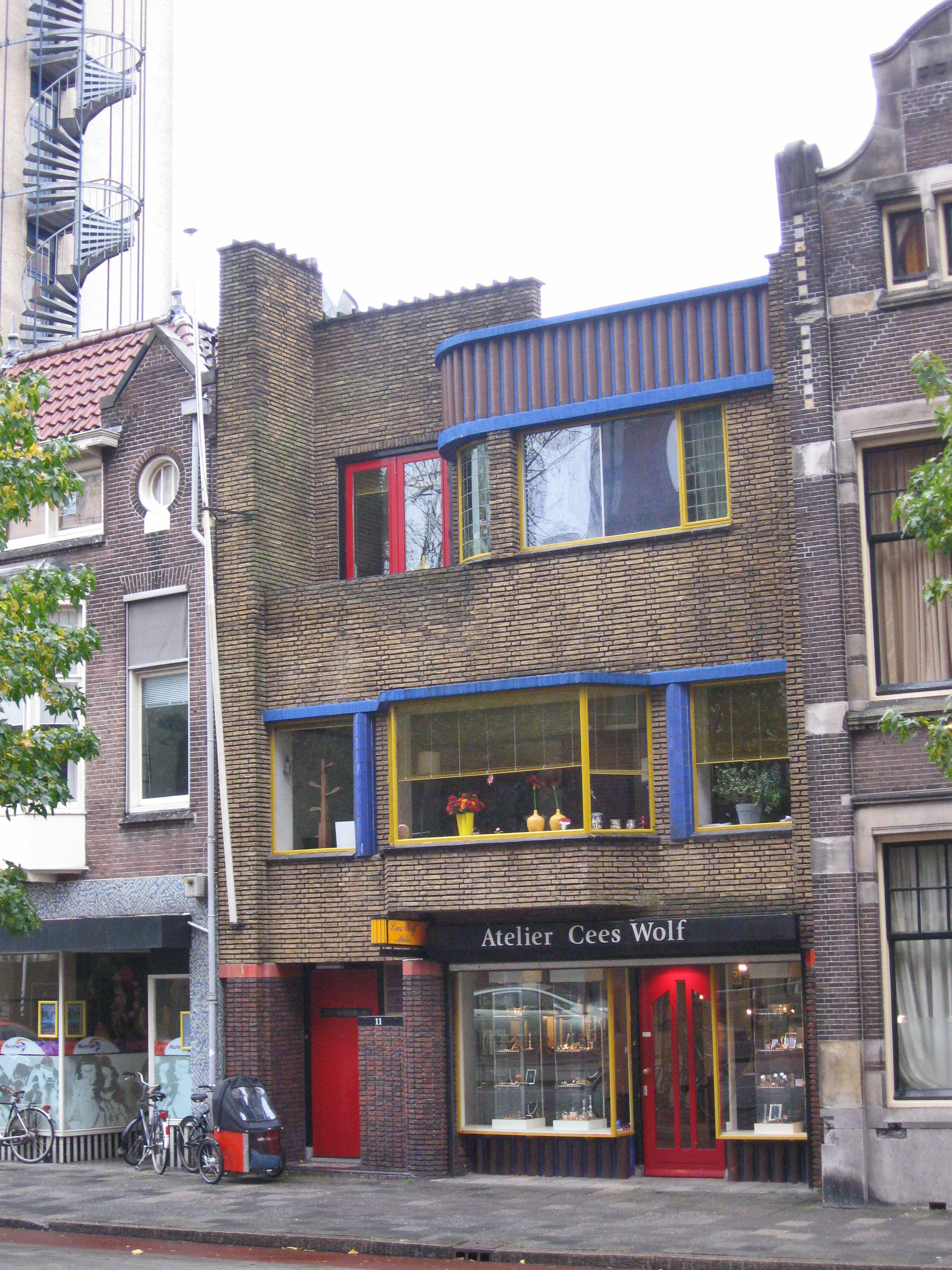 Groningen, Westerhaven 11, Winkel met bovenwoning, arch. H Rots, 1932; rm 485346